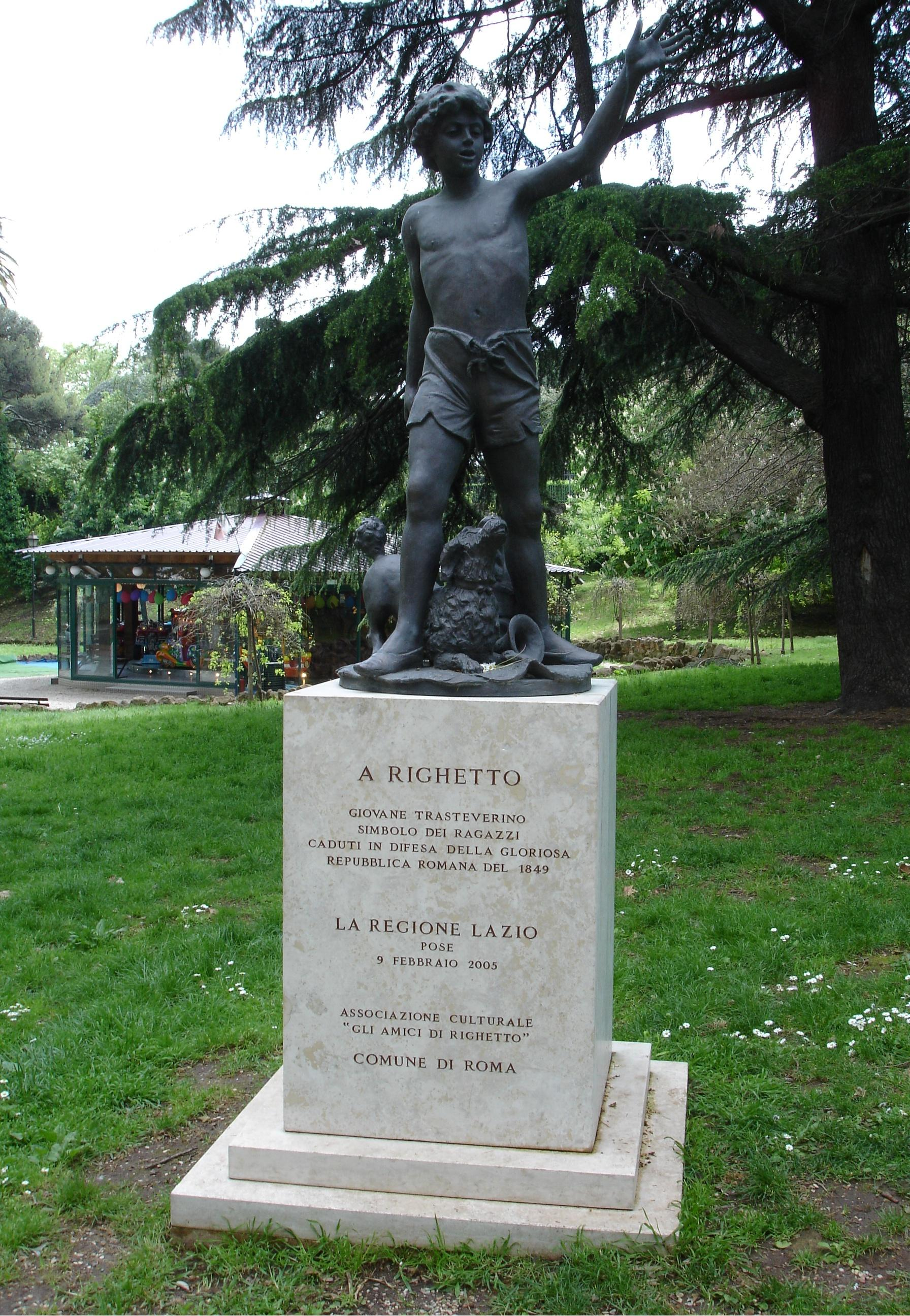 Replica in bronzo del marmo L'audace Righetto di Giovanni Strazza (1818-1875) [1851].